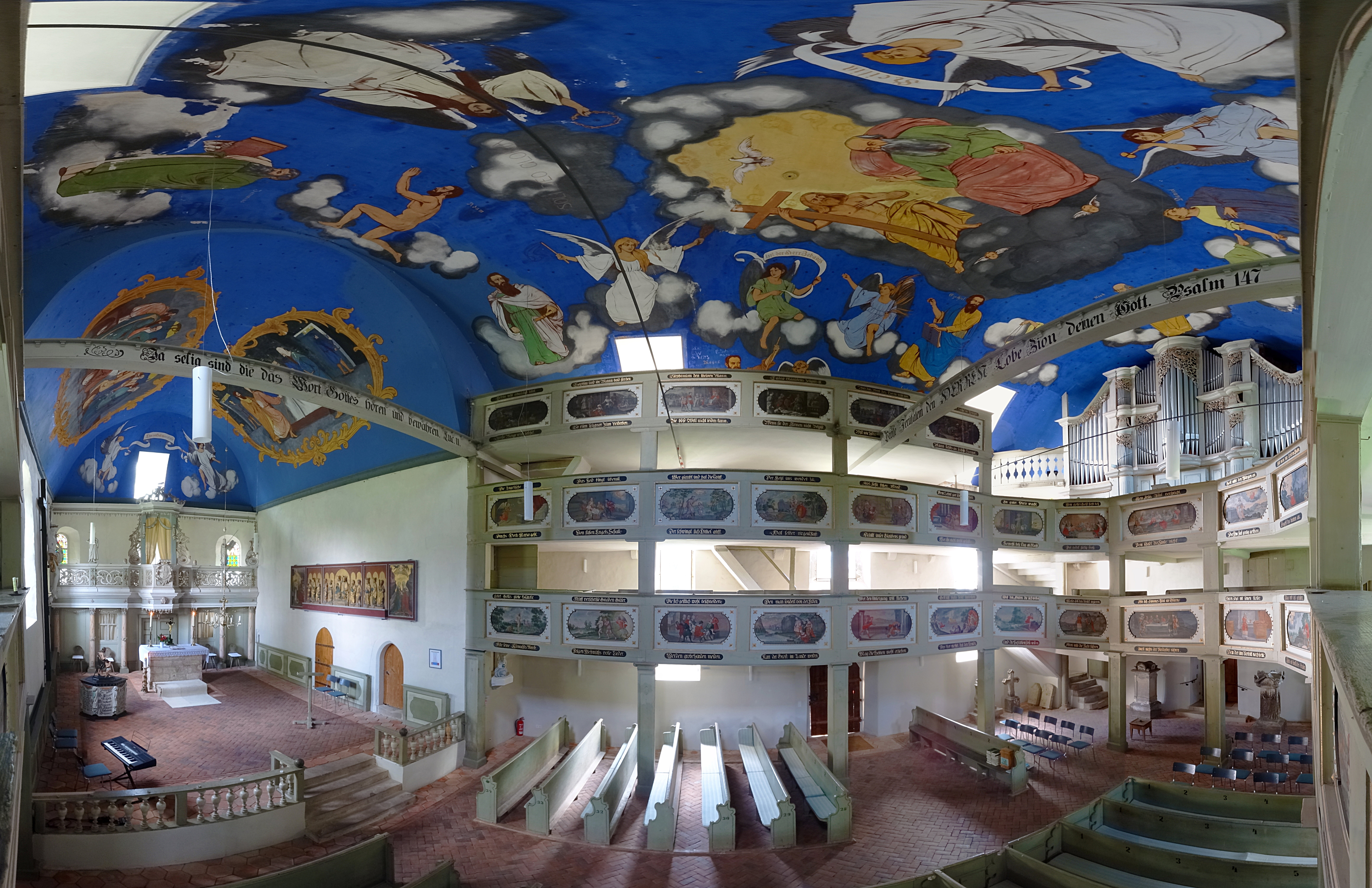 Innenraum Panorama St. Laurentius Kirchheim, Ausmalung mit biblischen Szenen und Figuren von Ernst Liebermann (1898)